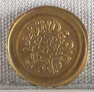 Palazzo Massimo alle Terme